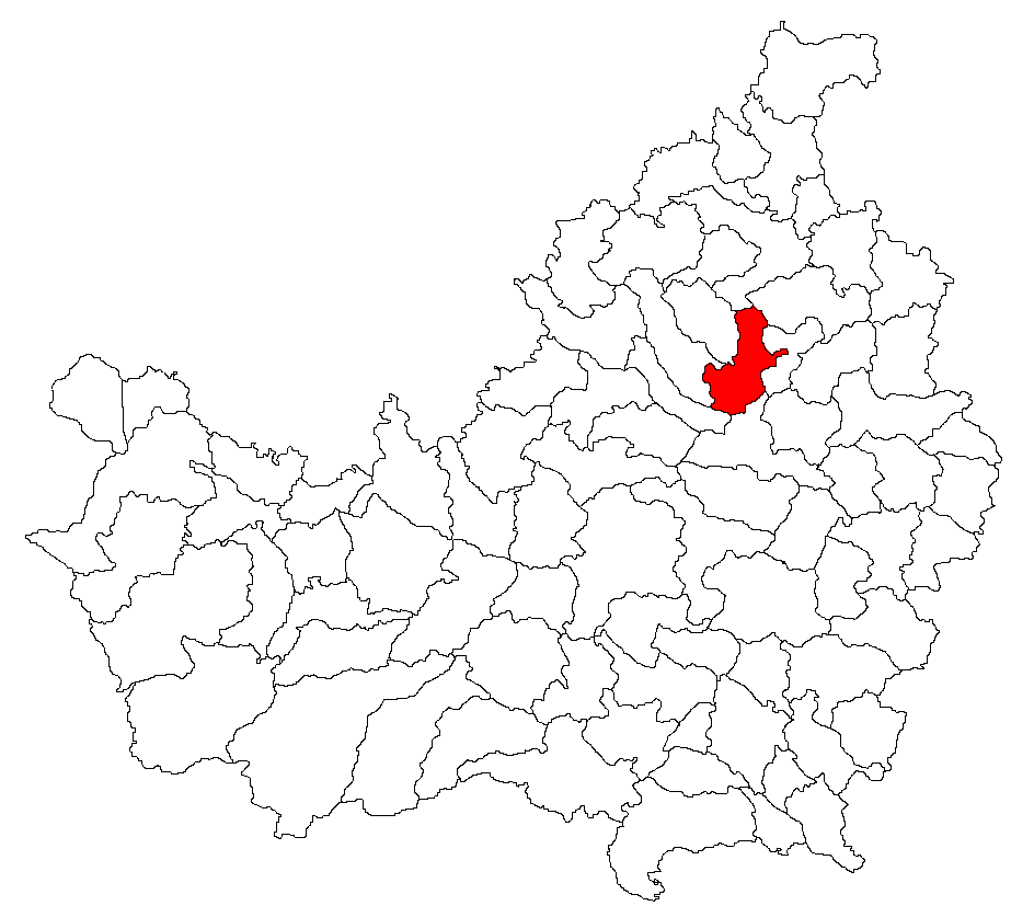 Categorie:Hărţi ale judeţului Cluj